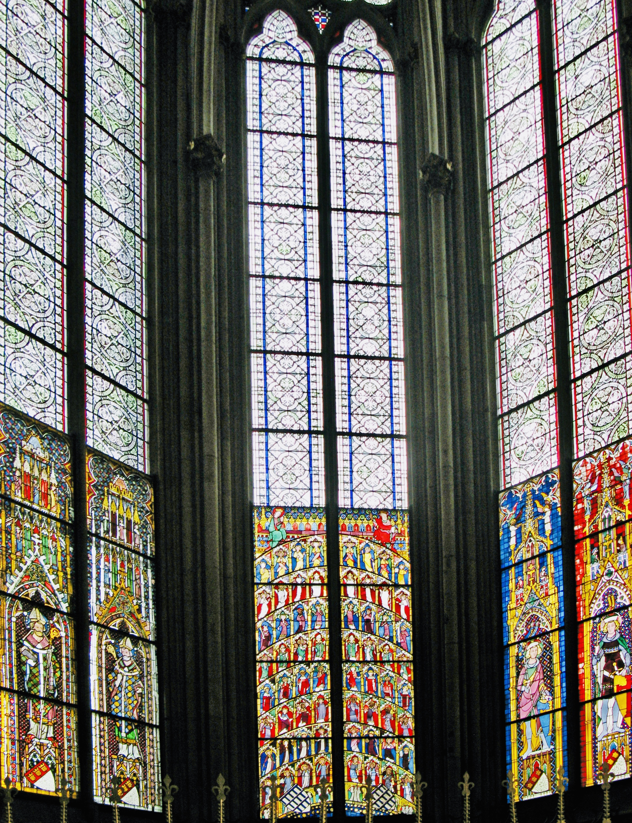 Kölner Dom, Domkloster 4This is a photograph of an architectural monument.